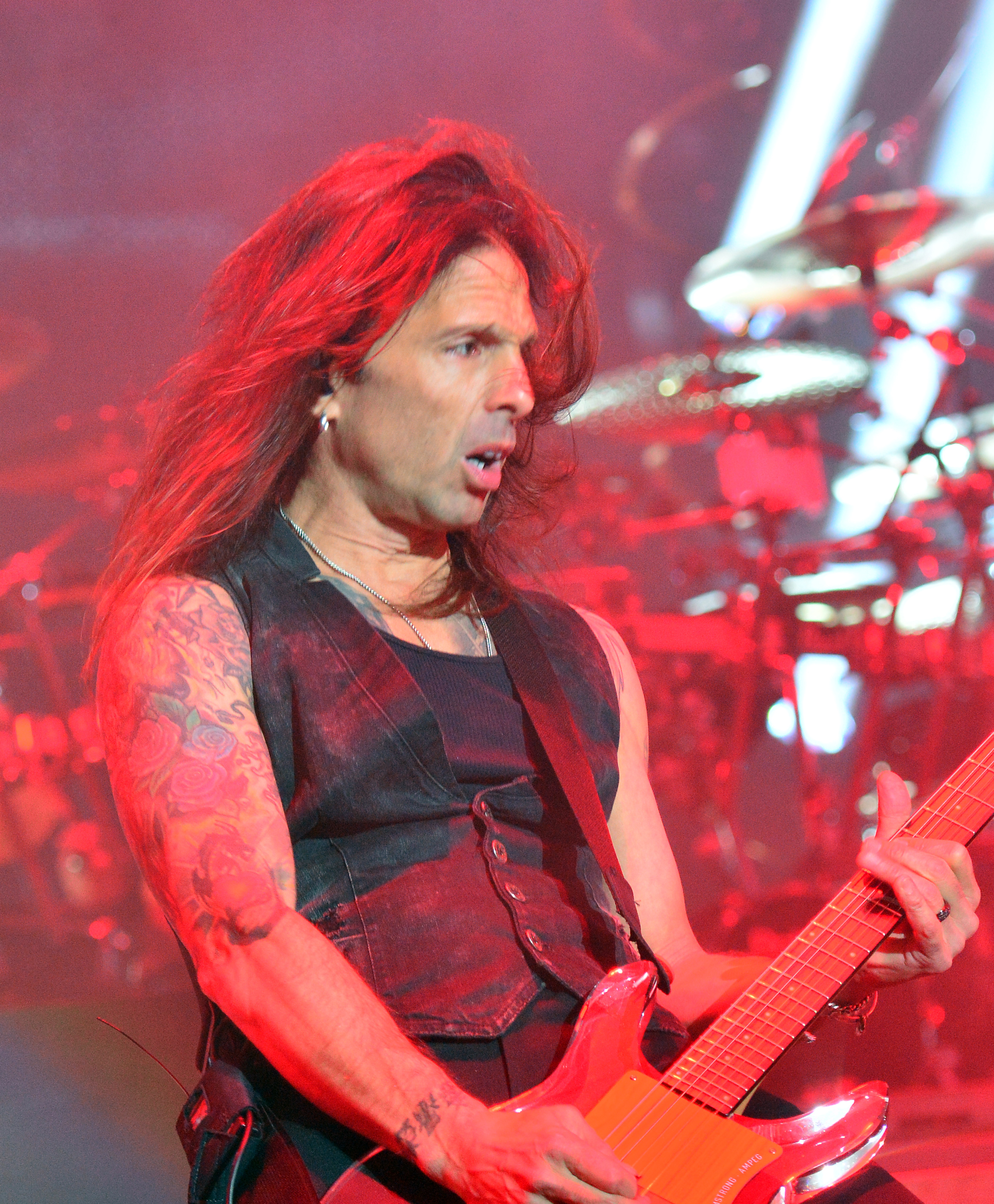 Savatage beim Wacken Open Air 2015